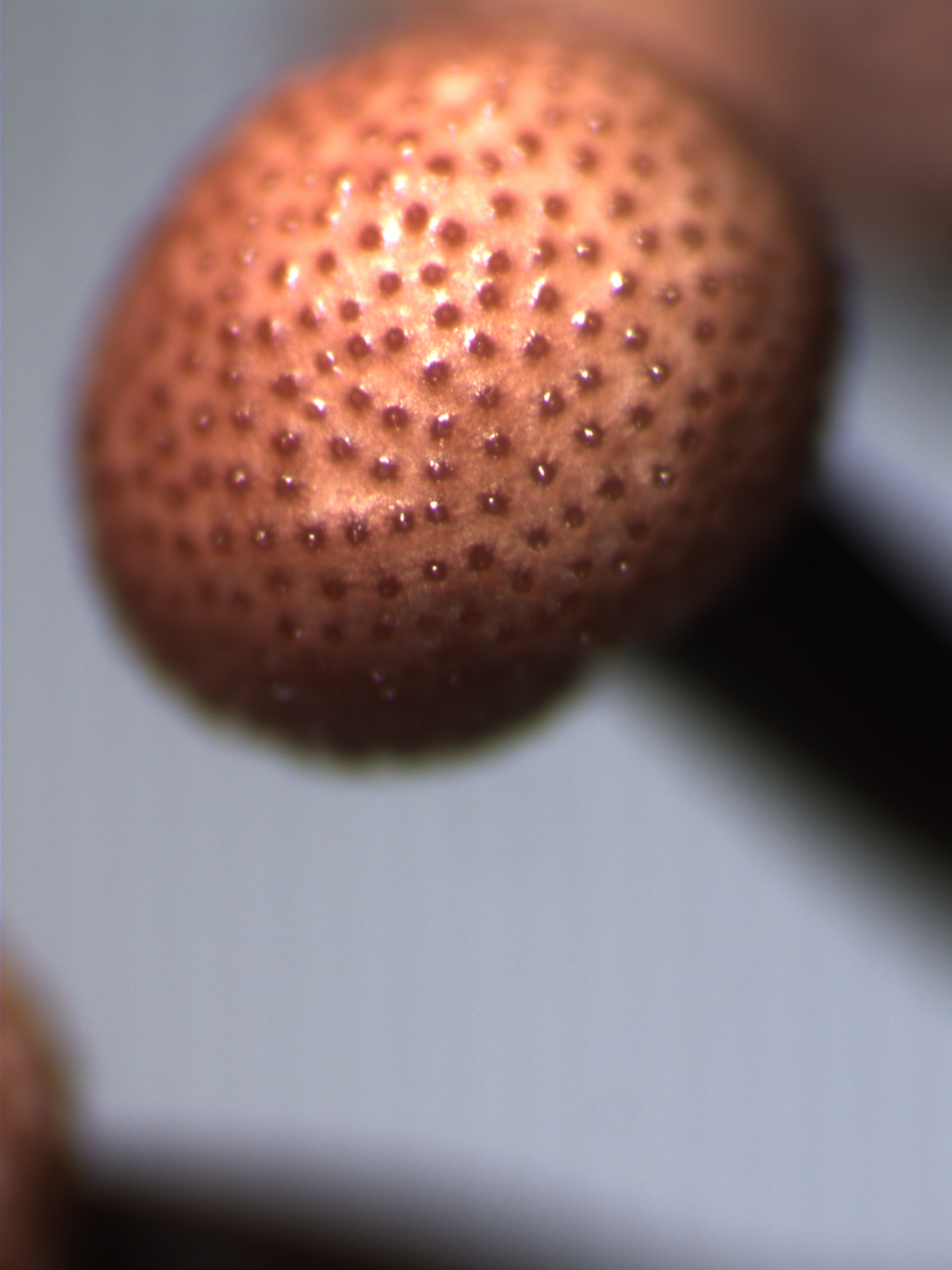 Stroma de Claviceps purpure